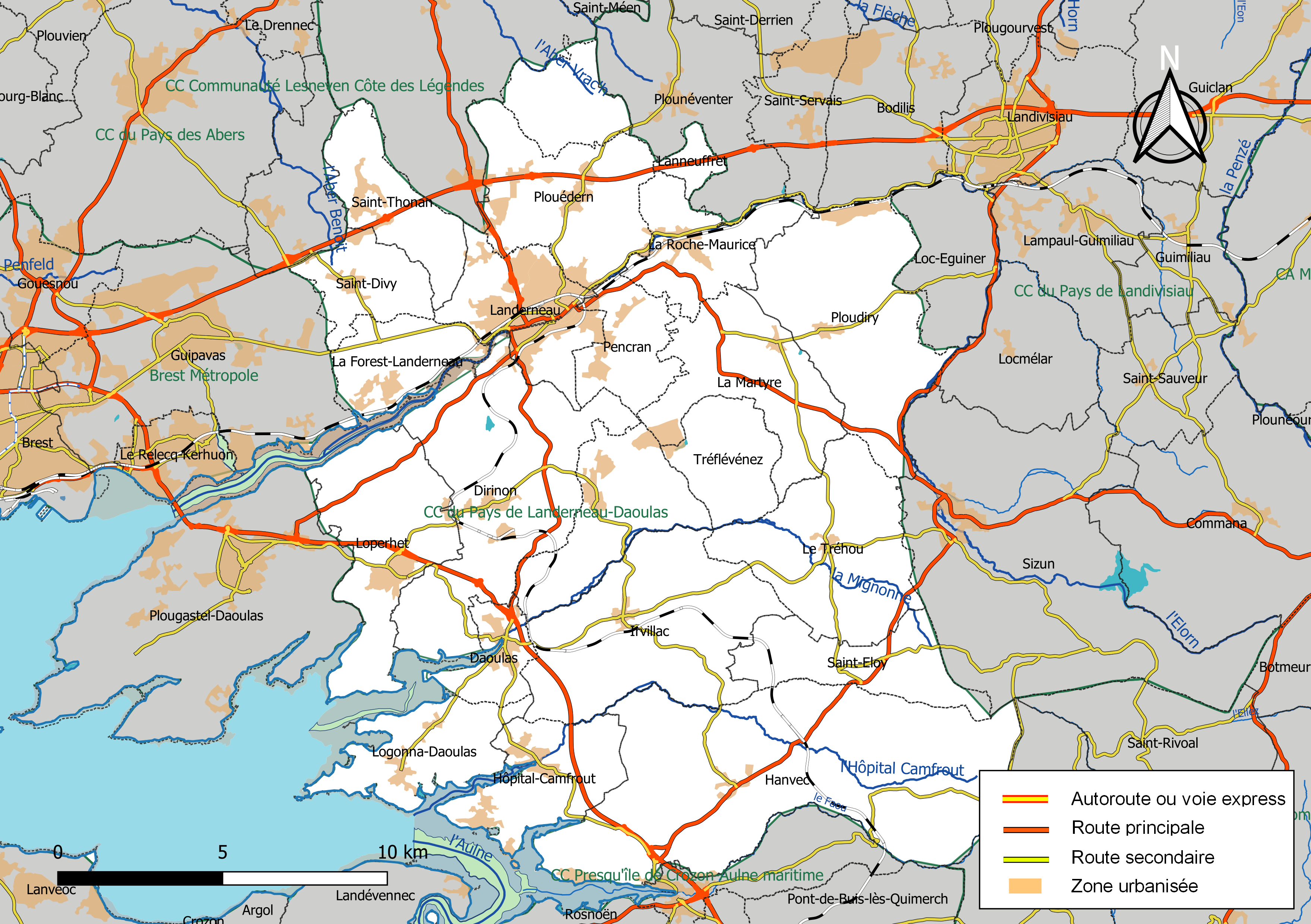 Carte géographique de la Communauté de communes du Pays de Landerneau-Daoulas, département du Finistère, France. Composition au 1er janvier 2019.